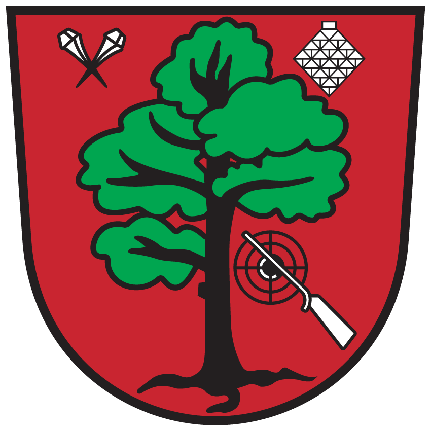 Wappen von Ferlach